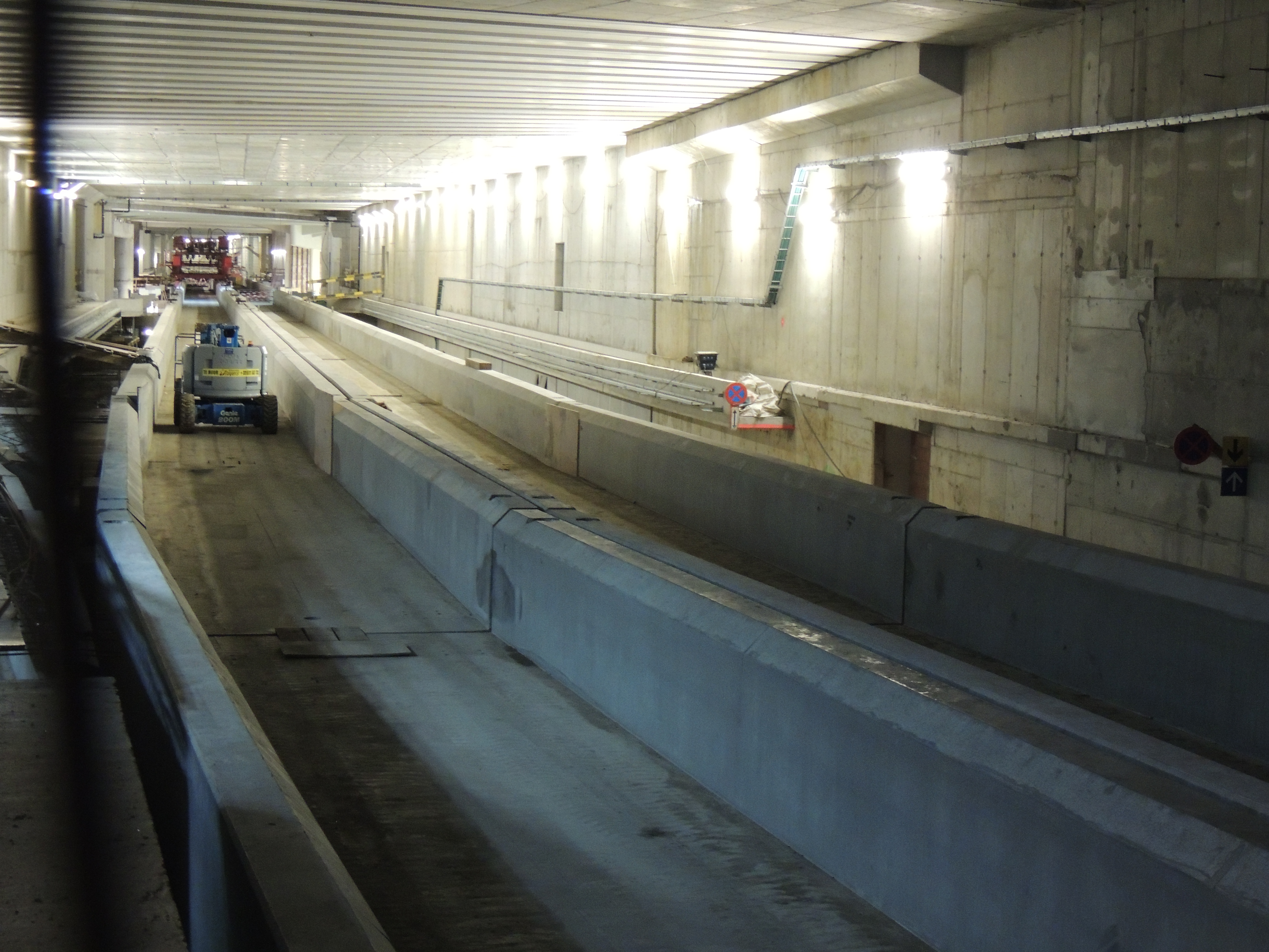 nouvelle voie vers Josaphat